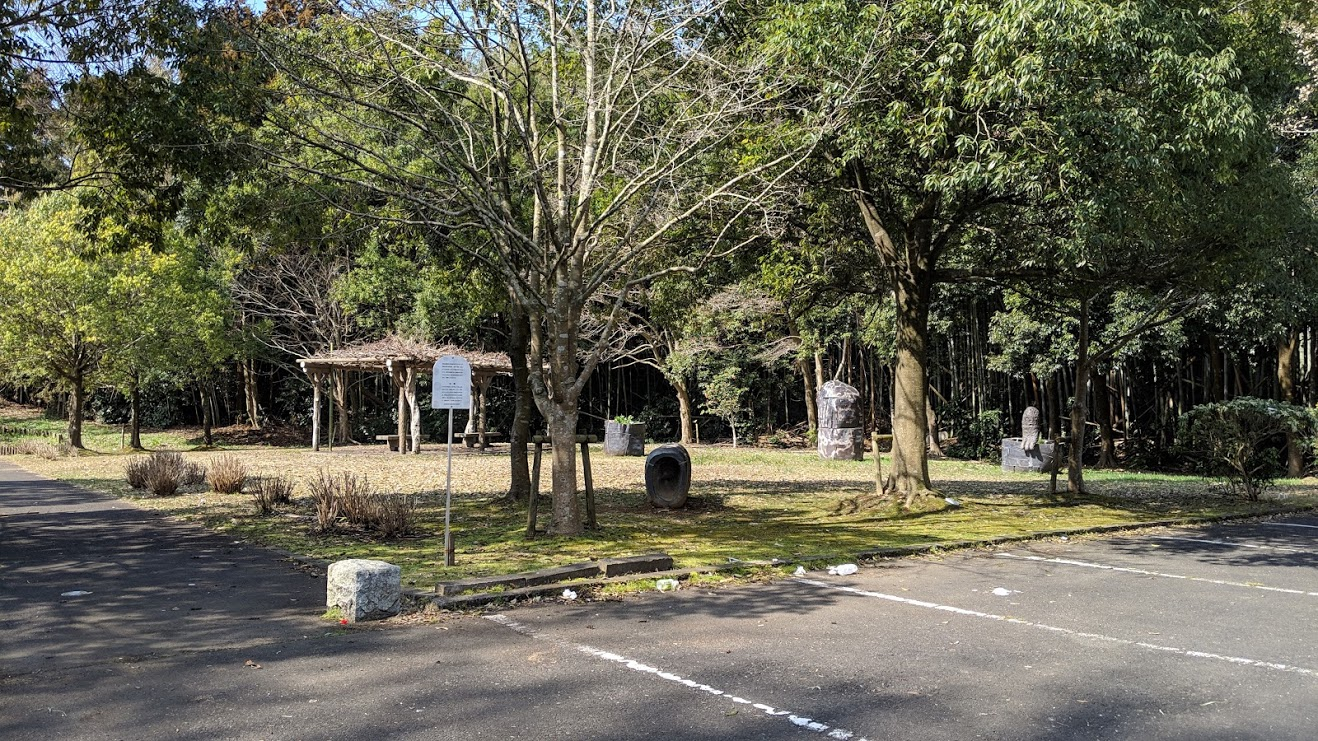 奥谷公園のトリックスター展示エリア